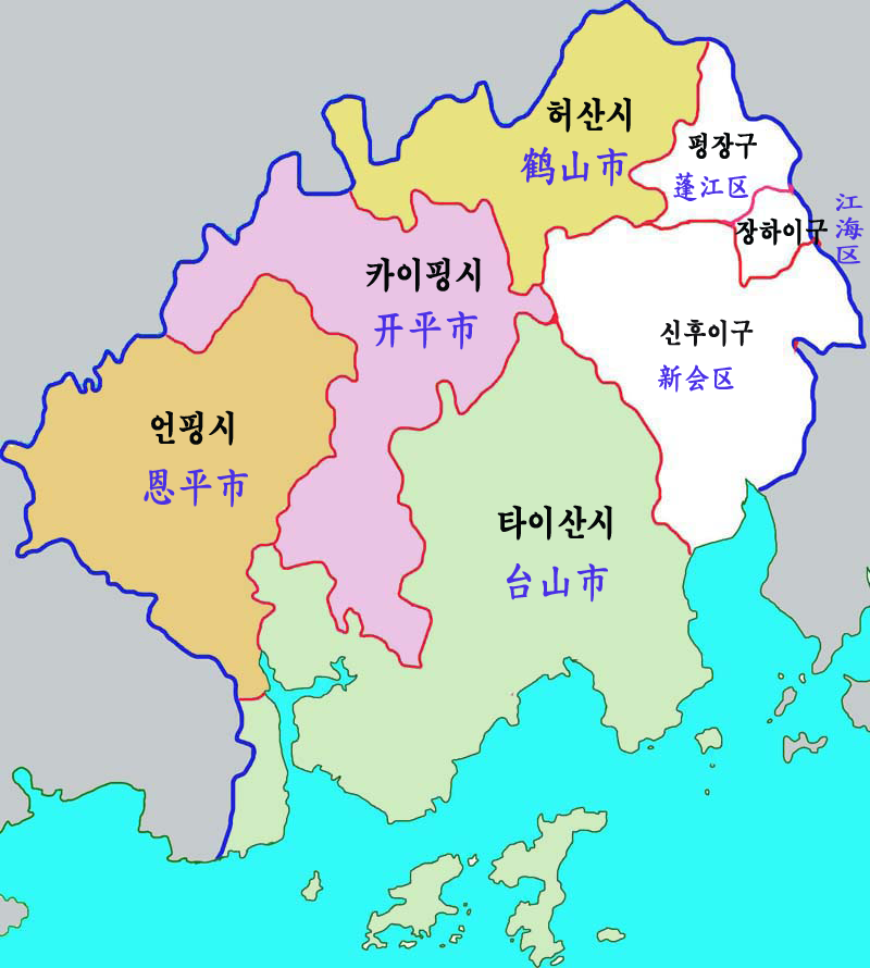 장먼시 현급구역